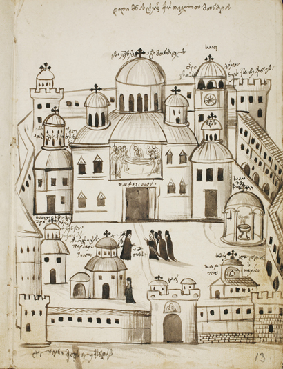 H 842 timote gabashvili mimosvla.XVIII